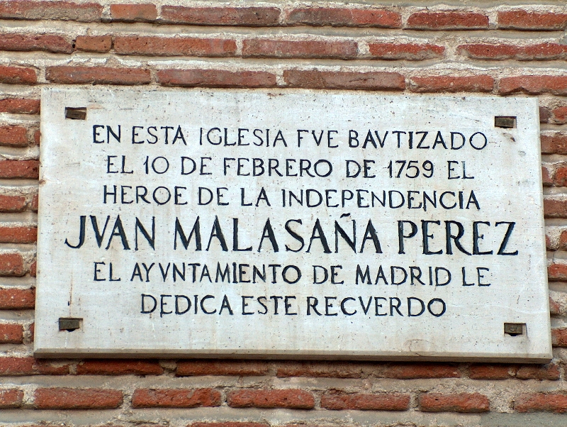 Villa de Vallecas (Madrid, España) : Iglesia de San Pedro ad Víncula, fachada principal, placa conmemorativa del Bautizo de Juan Malasaña en el año 1759.